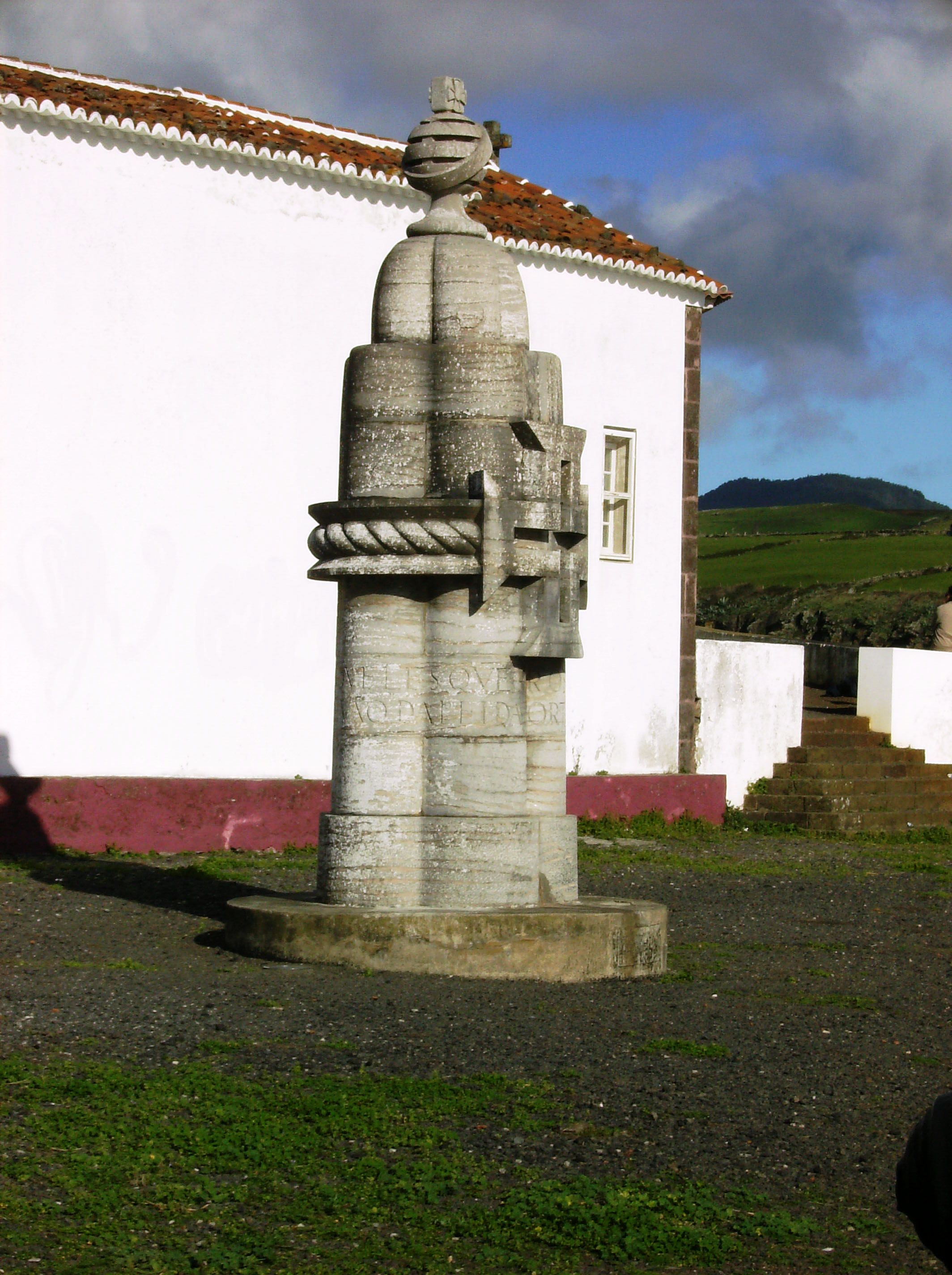 Monumento em homenagem aos heróis do NRP Augusto de Castilho (Raúl Lino, 1929), no terrapleno do Forte de São Brás de Vila do Porto, ilha de Santa Maria, Açores.